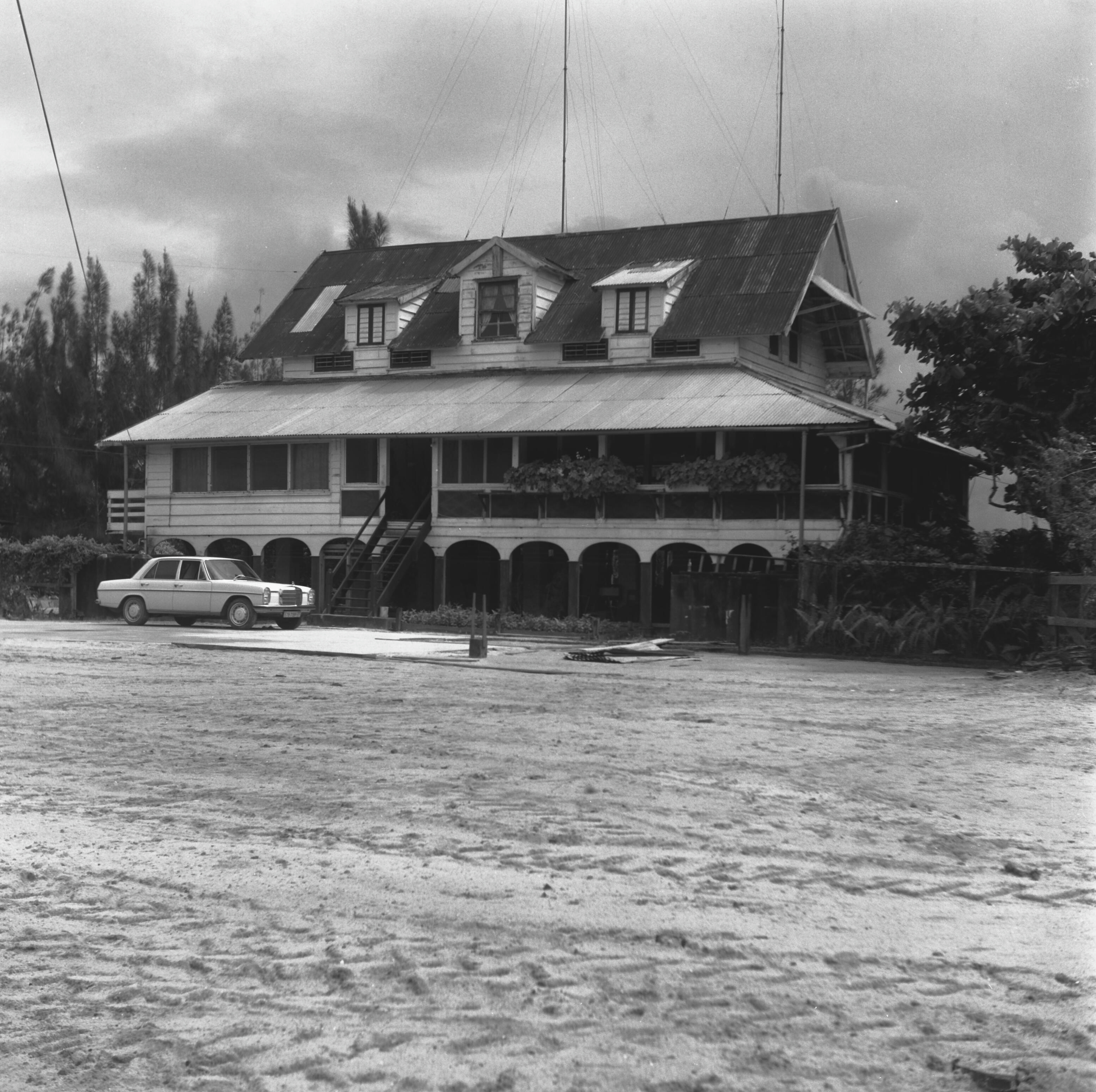 Plantagehuis, voorgevelOnderwerp: plantages, Huizen